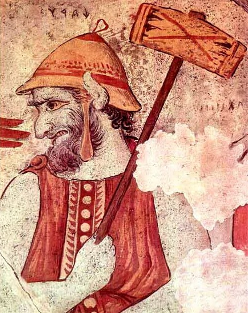 Tomba François di Vulci - Caronte